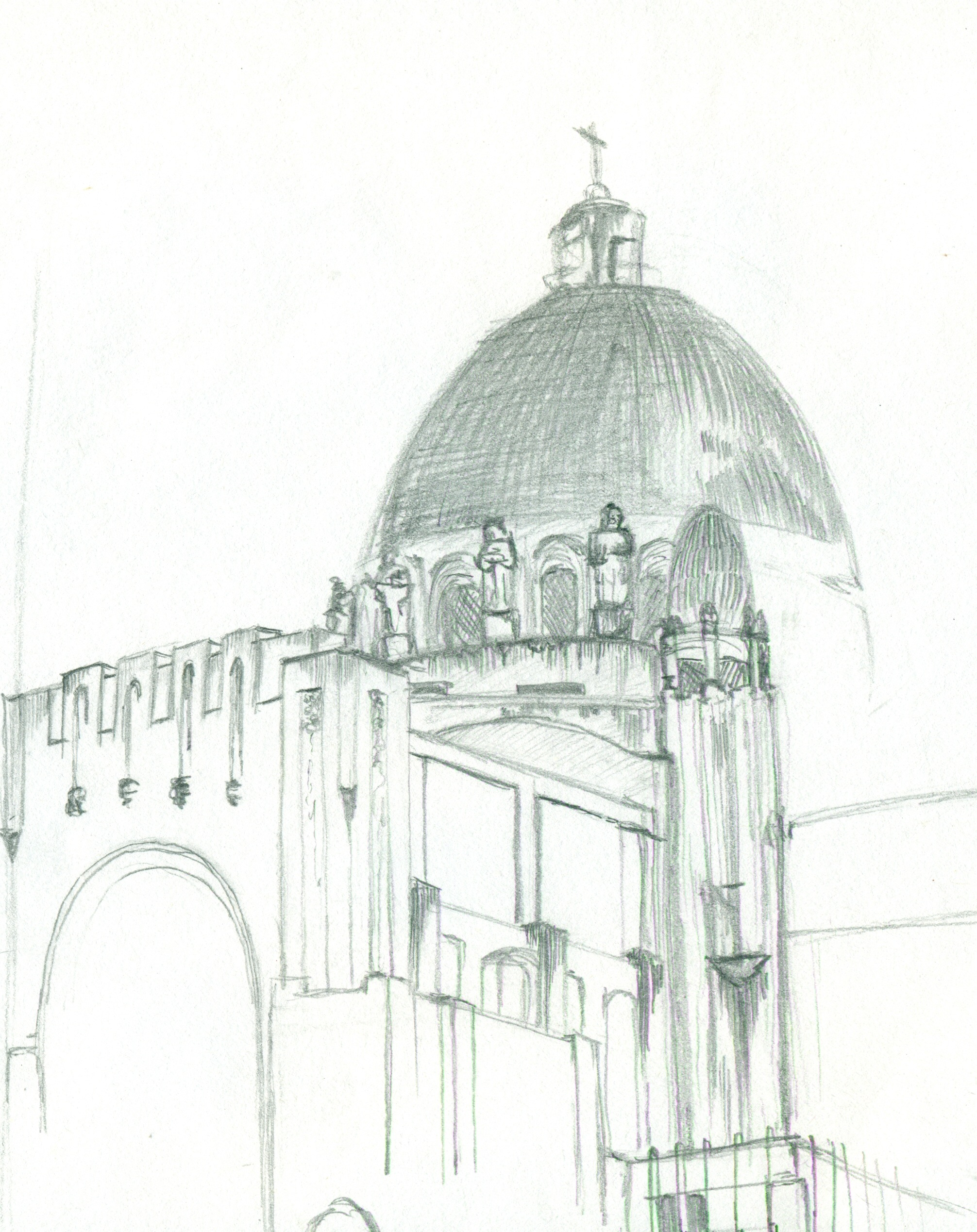 croquis Basilica Lourdes(Chile)